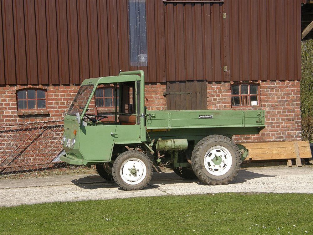 Ponny von Platten + Söhne in Norddeutschland